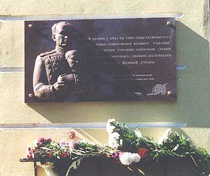 Капитохин Александр Григорьевич с воспитанником Тамбовского Суворовского Училища